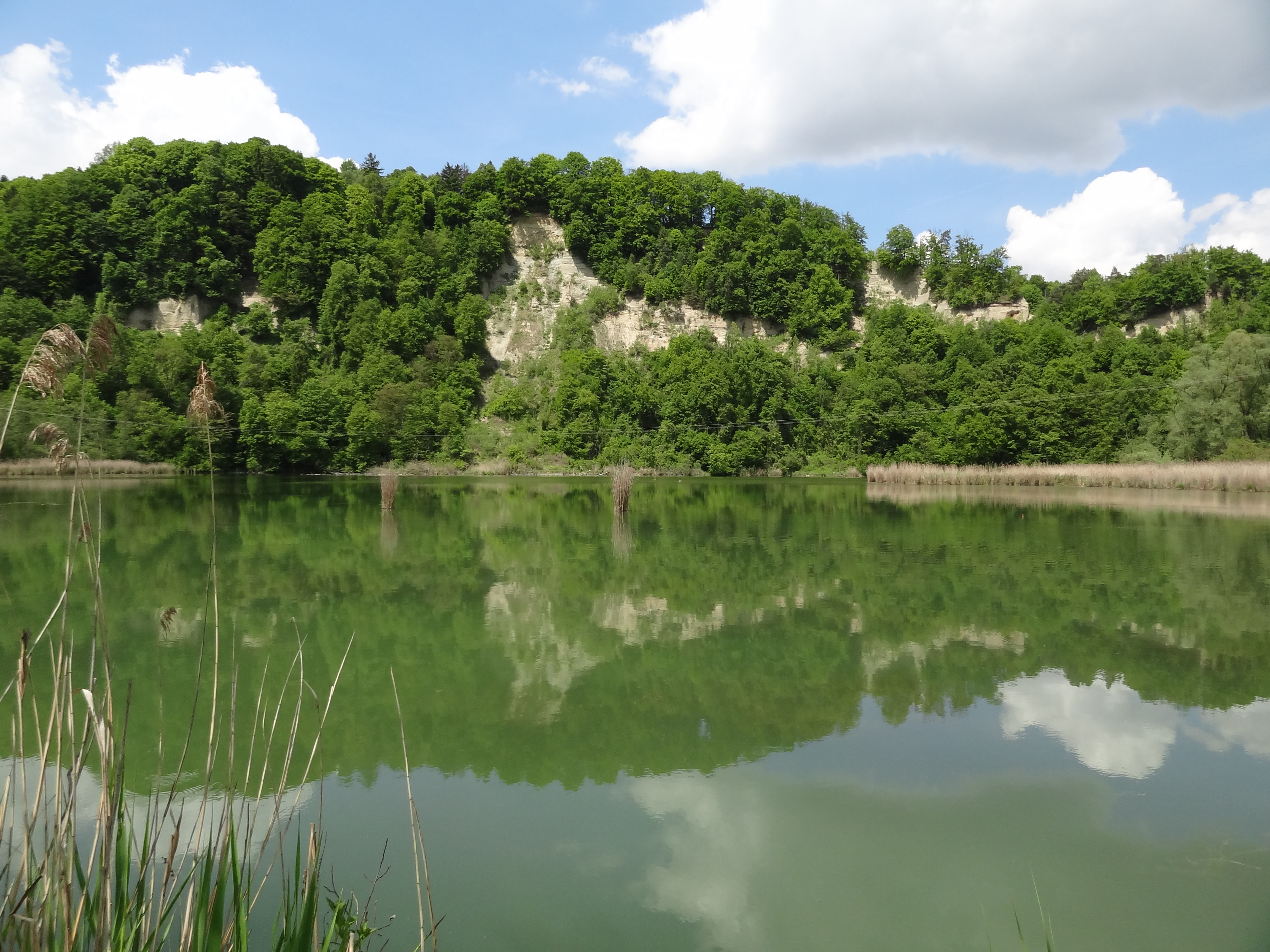 Naturschutzgebiet „Innleite bei Marktl mit Dachlwand“ (NSG 00272.01): Die Innleite, insbesondere die Dachlwand, ist ein eindrucksvolles ehemaliges Steilufer des Inn mit weit ins Tertiärhügelland zurückreichenden Schluchten, die noch in ihrem ursprünglichen naturhaften Zustand erhalten sind.